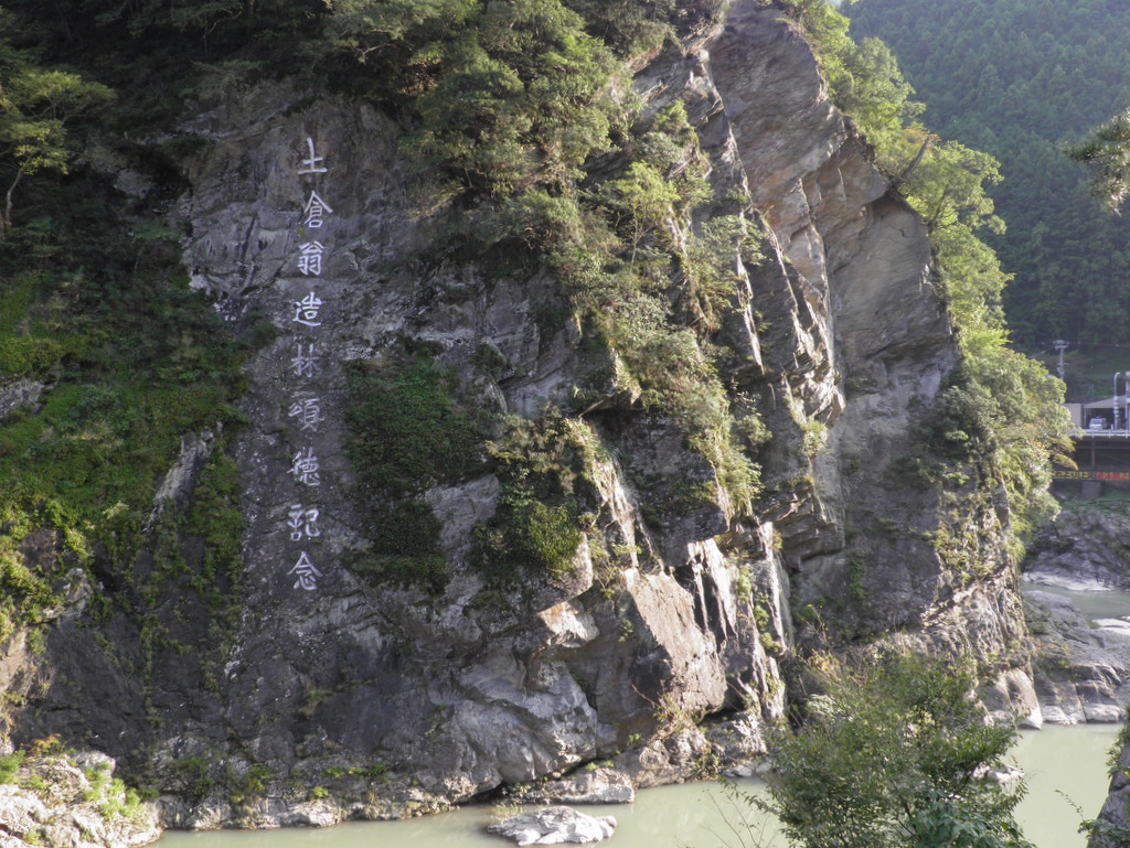 磨崖碑「土倉翁頌徳記念」（奈良県吉野郡川上村大滝） 案内板によれば「大正10年（1921）3月18日着工、同年5月30日完成。総費用1800円（当時）、一字の大きさ1.8m×1.8m、字の深さ36cm、全長23.6m、土倉庄三郎に林業を教わった東京帝国大学、本多静六によって、土倉氏が亡くなった4年後に作られた。文字を書いた人、書家、後藤朝太郎、彫った人、和田誠一郎」とのこと。